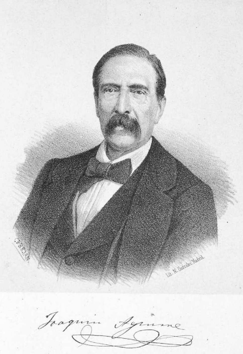 Retrato de Joaquín Aguirre, litografía de José Cebrián García. Biblioteca Nacional de España